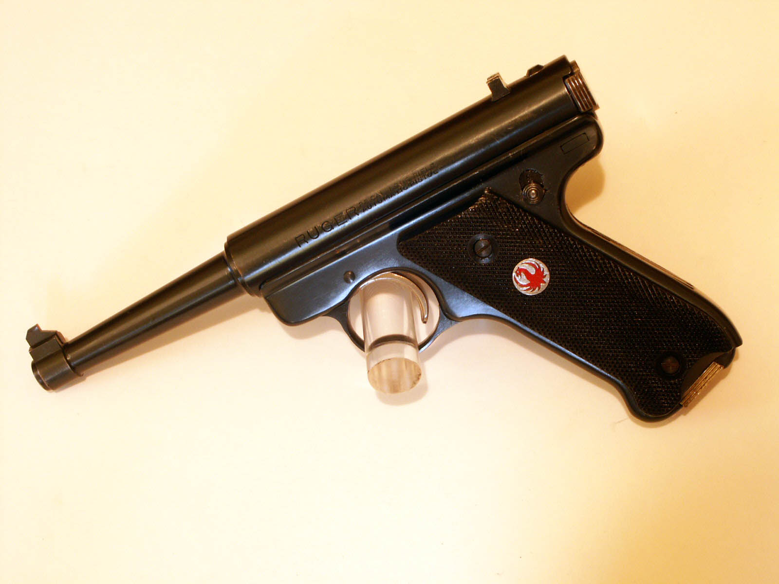 Ruger Red Eagle